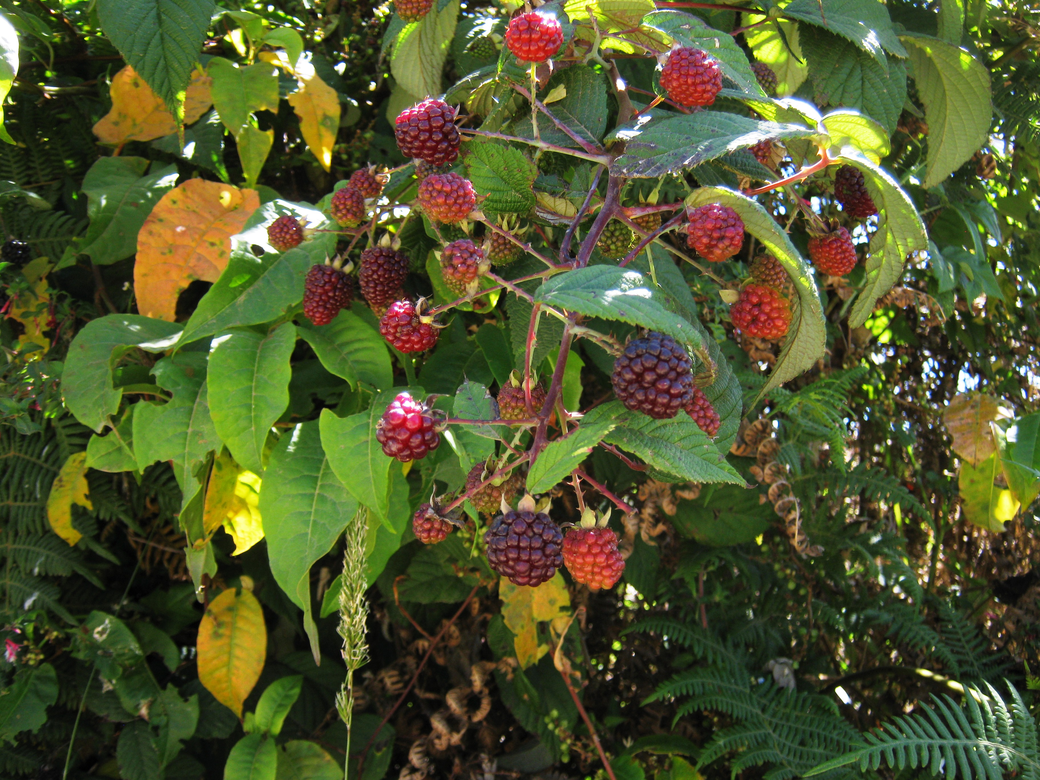 Fotos tomadas en trinidad, Dota